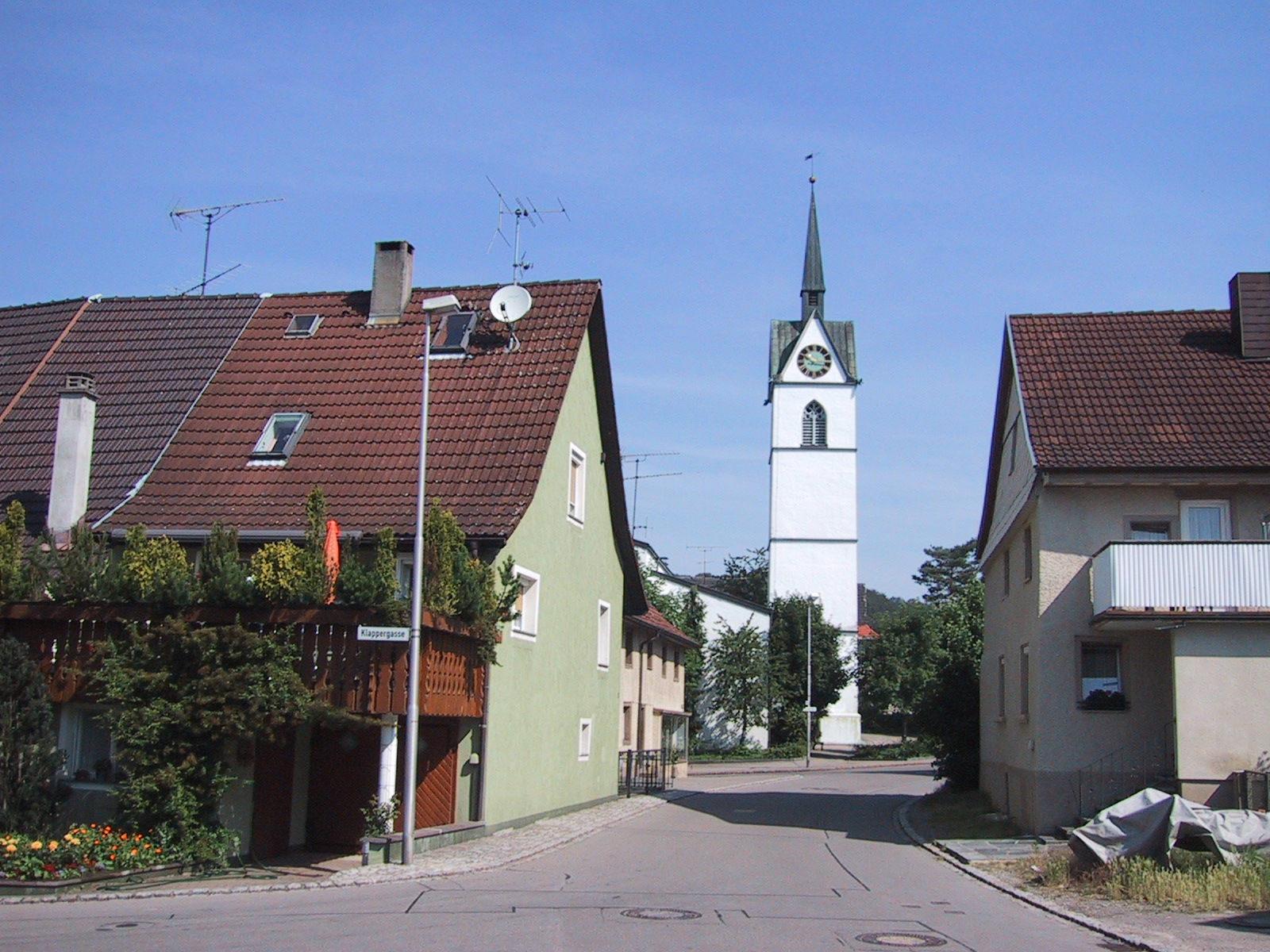 Katholische Dorfkirche in Jestetten, Landkreis Waldshut, Deutschland